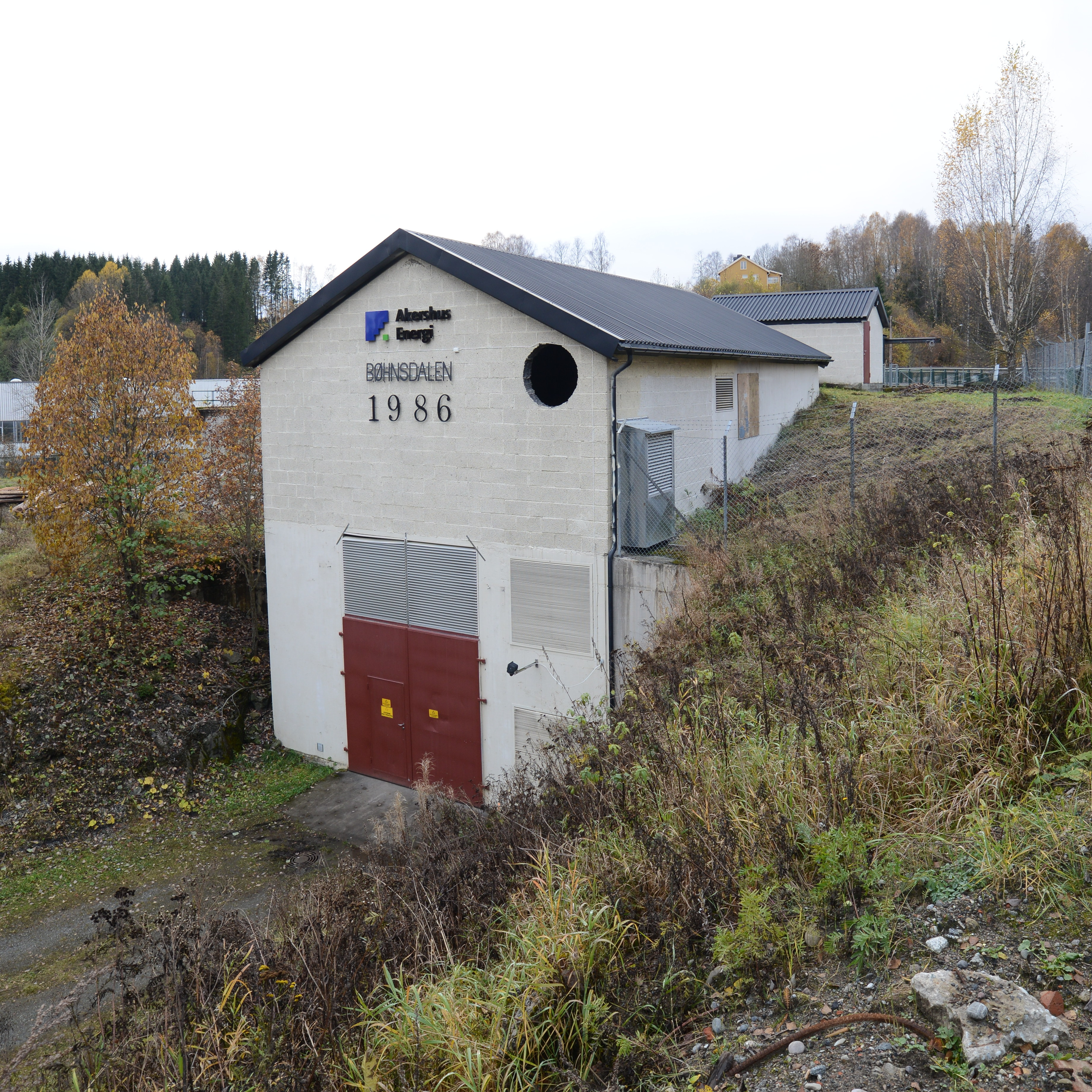 Bønsdalen kraftverk